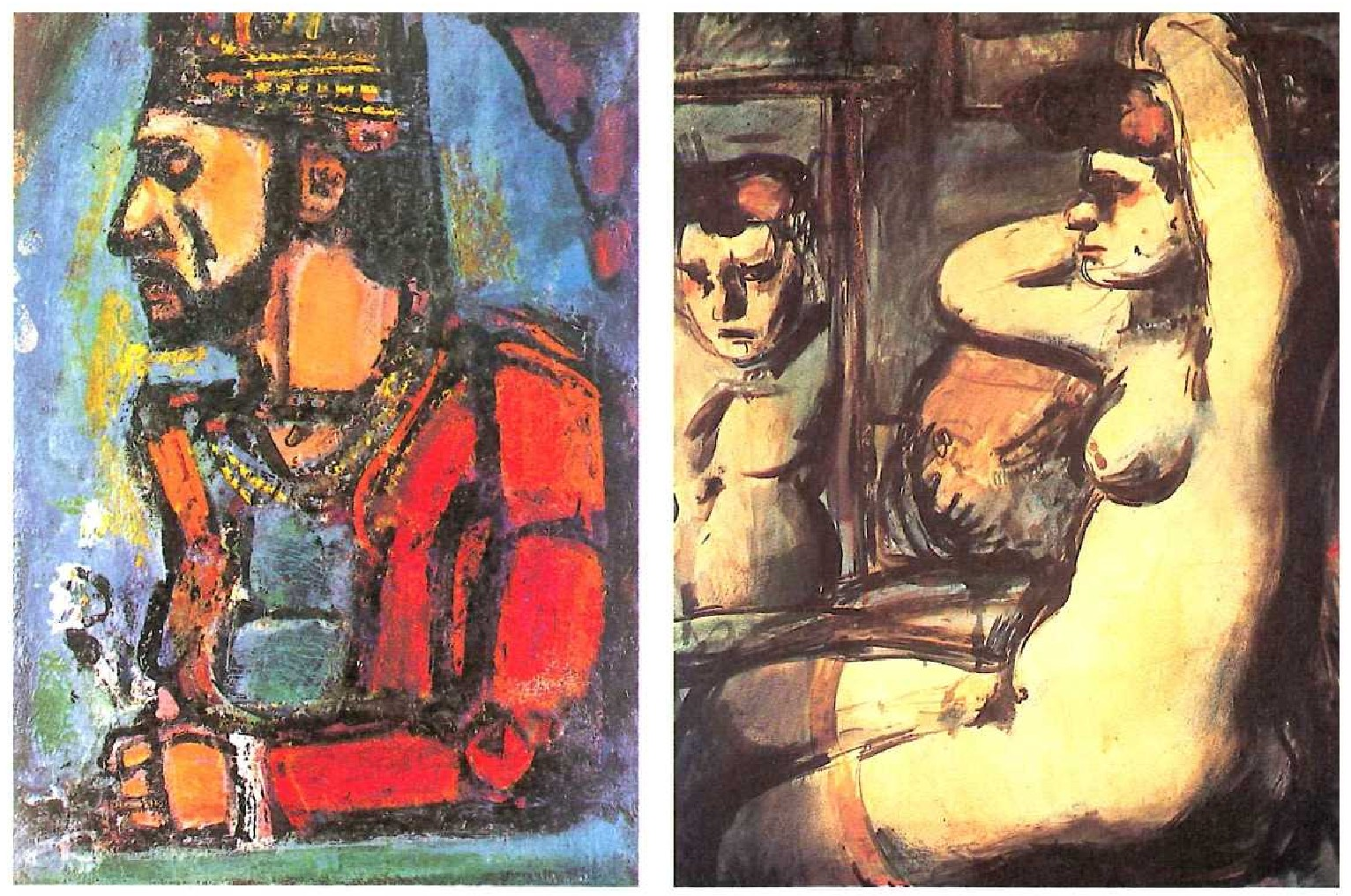 Ezkerrean, Rouaulten Errege Zabarra (1916-1937), Carnegie Institute, Pittsburg. Eskuinean, egile beraren Emagaldua ispiluaren aurrean (1906 ing.), Georges Pompidou Arte Modernoko Nazio Museoa, Paris.